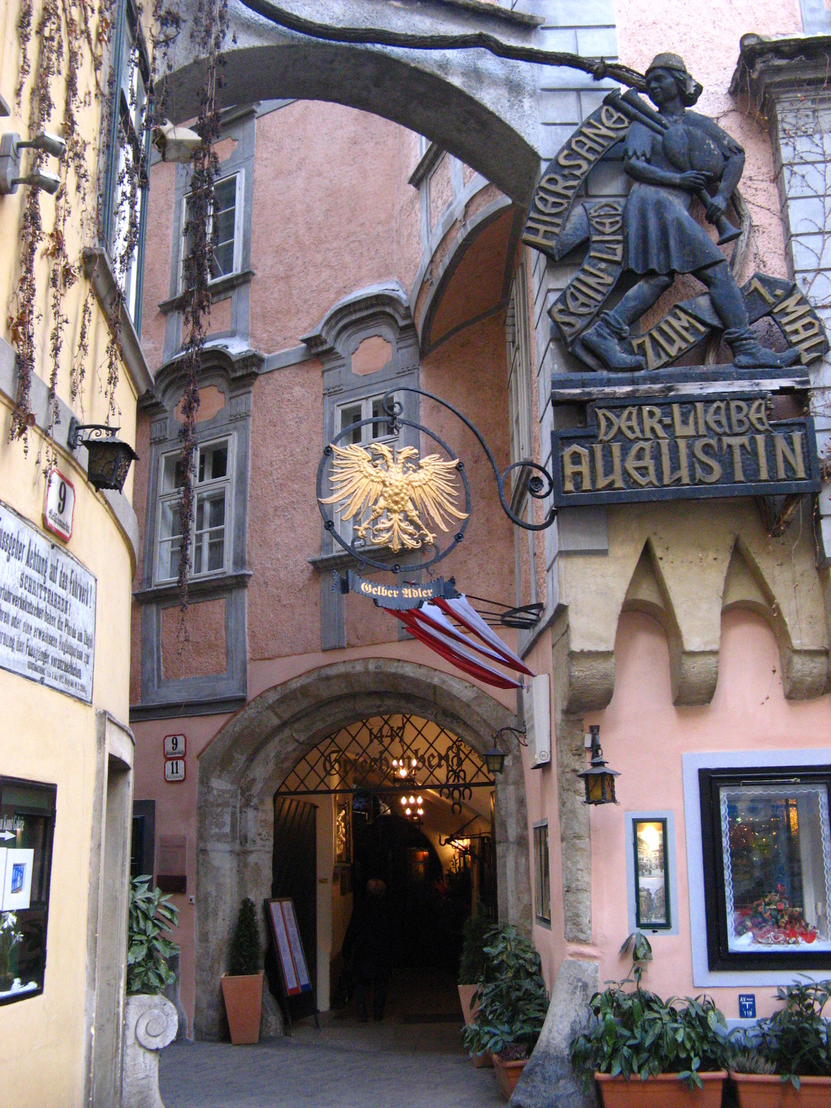 Vienna